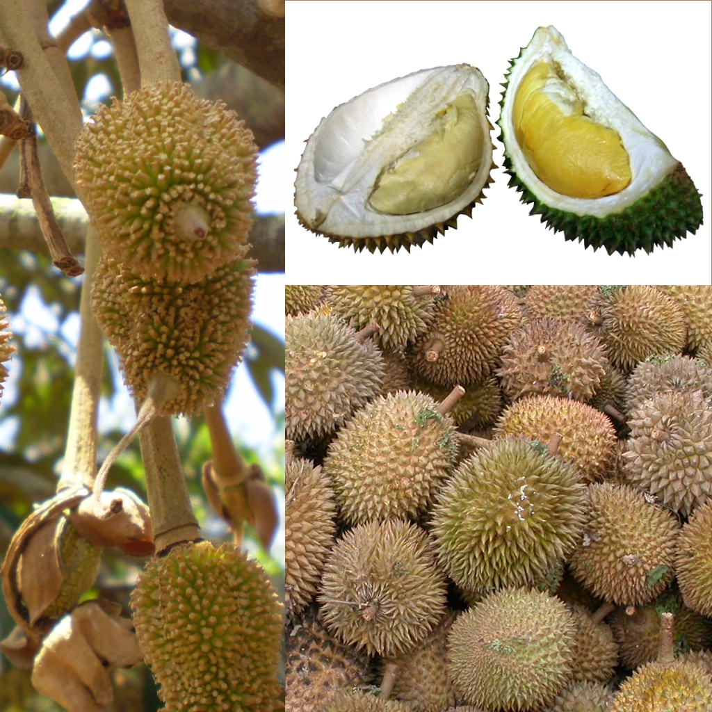 Grafika podręcznika Wikijunior:Owoce. Durian właściwy (Durio zibethinus).